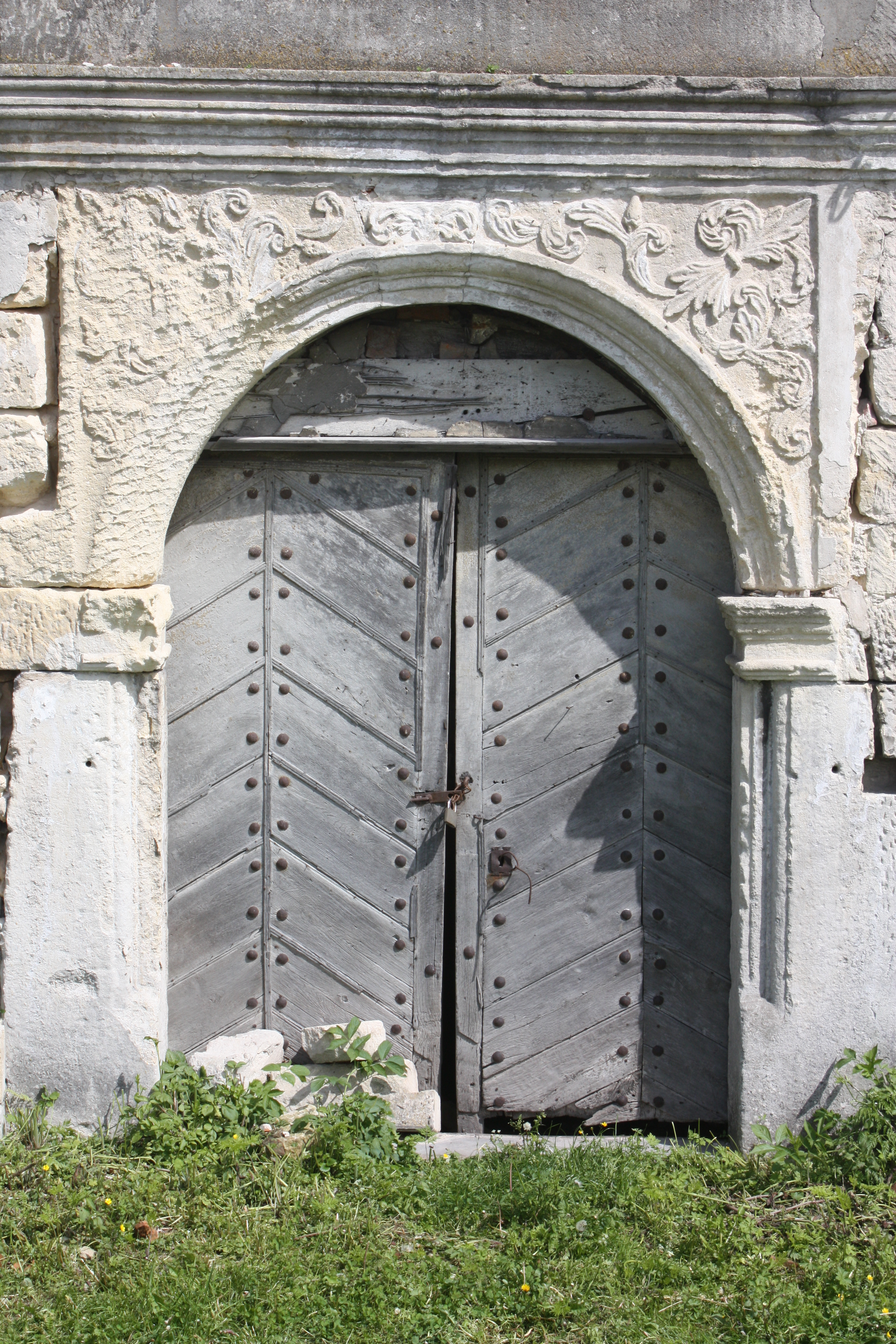 Podhajce (Підгайці), kościół Trójcy Świętej. Portal główny stan 2010